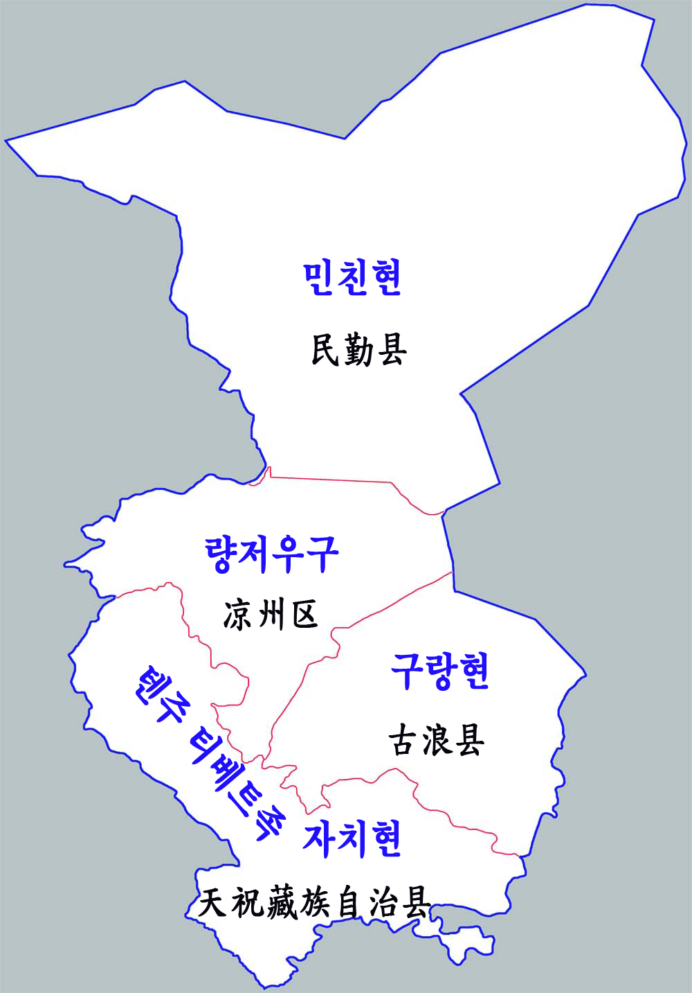 우웨이시 현급행정구역도